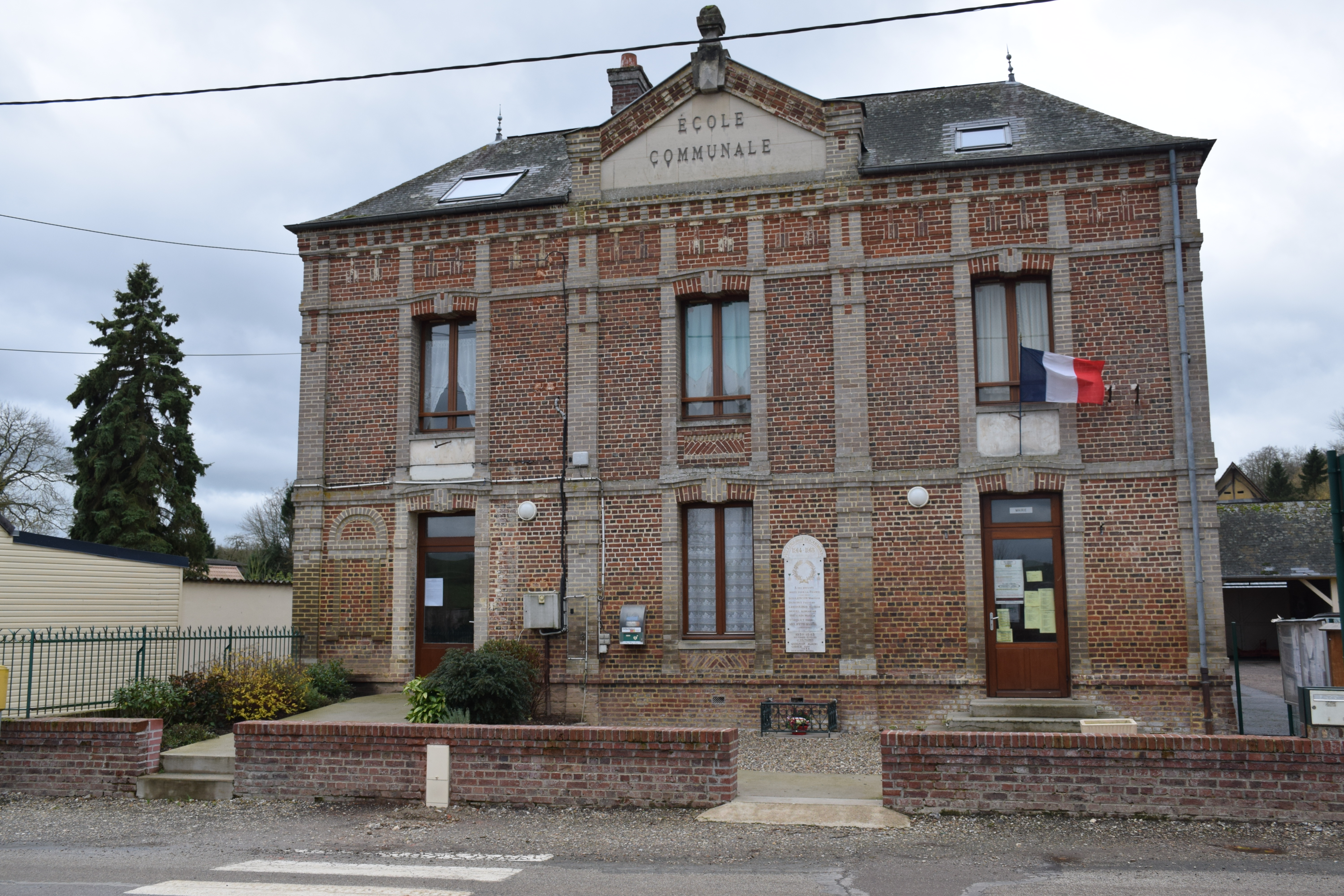 La Mairie